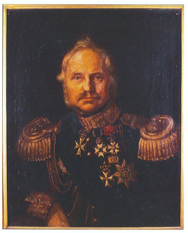 De Nederlandse generaal List